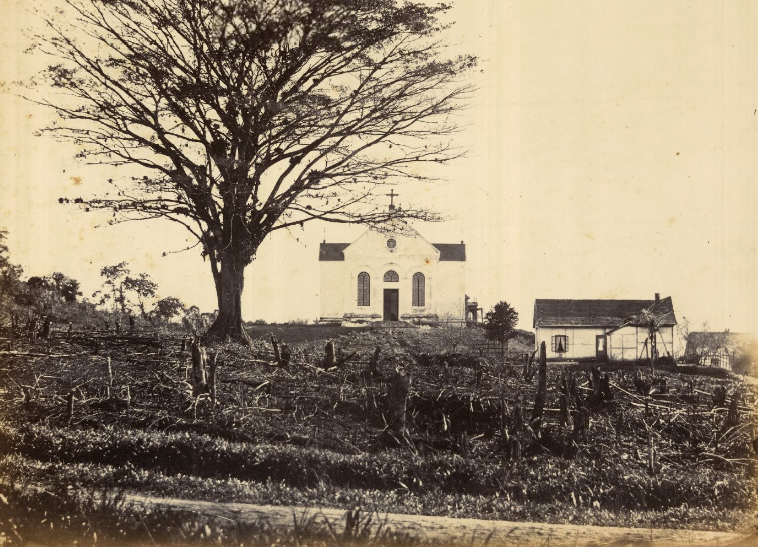 Imagem Fotográfica da Colônia Dona Francisca datada de 1866. Casa de Oração Protestante (lado esquerdo) e uma casa enxaimel (lado direito). Colônia Dona Francisca, atual cidade de Joinville (a maior cidade do estado de Santa Catarina).